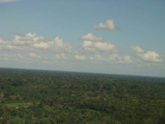 vista de arriba de Amazonas